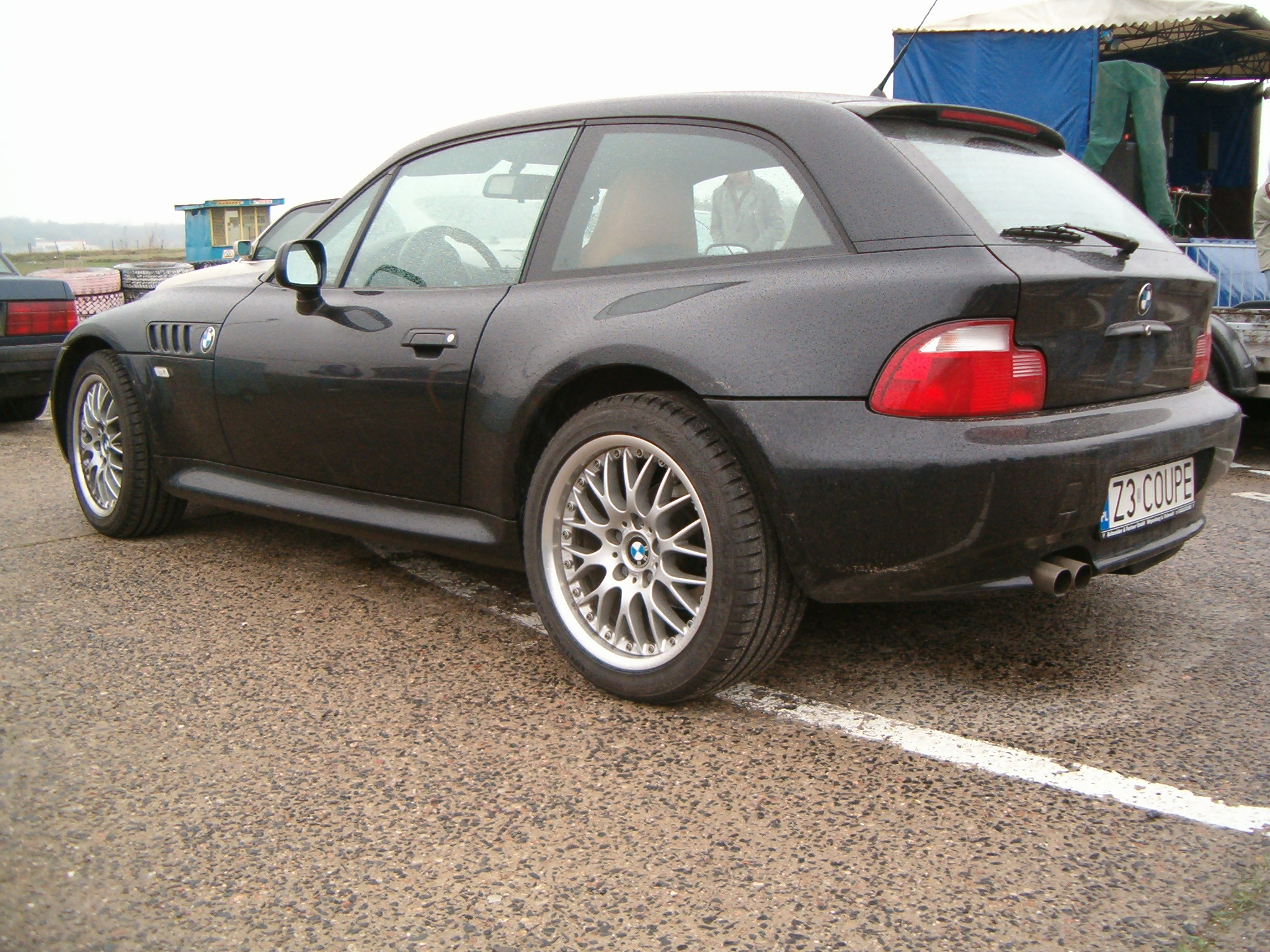 BMW Z3 Coupe, Styling 42. Zlot BMW M Power Club w Toruniu.